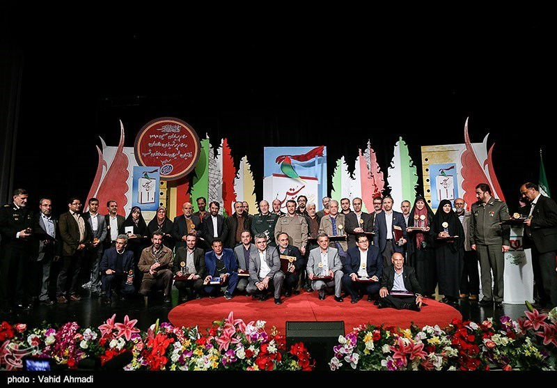 برگزیدگان هفدهمین دوره انتخاب بهترین کتاب دفاع مقدس به همراه برگزارکنندگان در مراسم اختتامیه -بهمن 1396 تهران